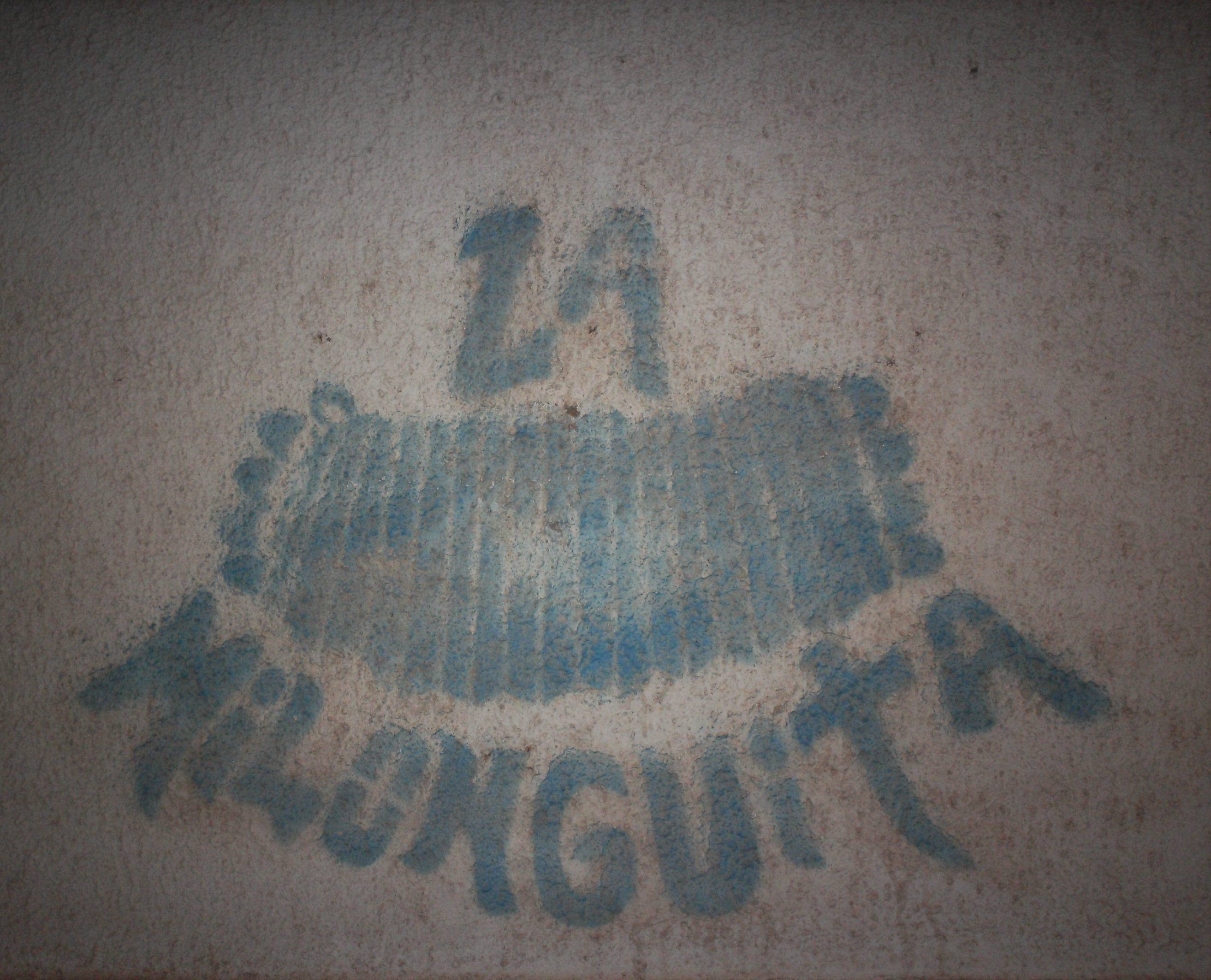 La Milonguita